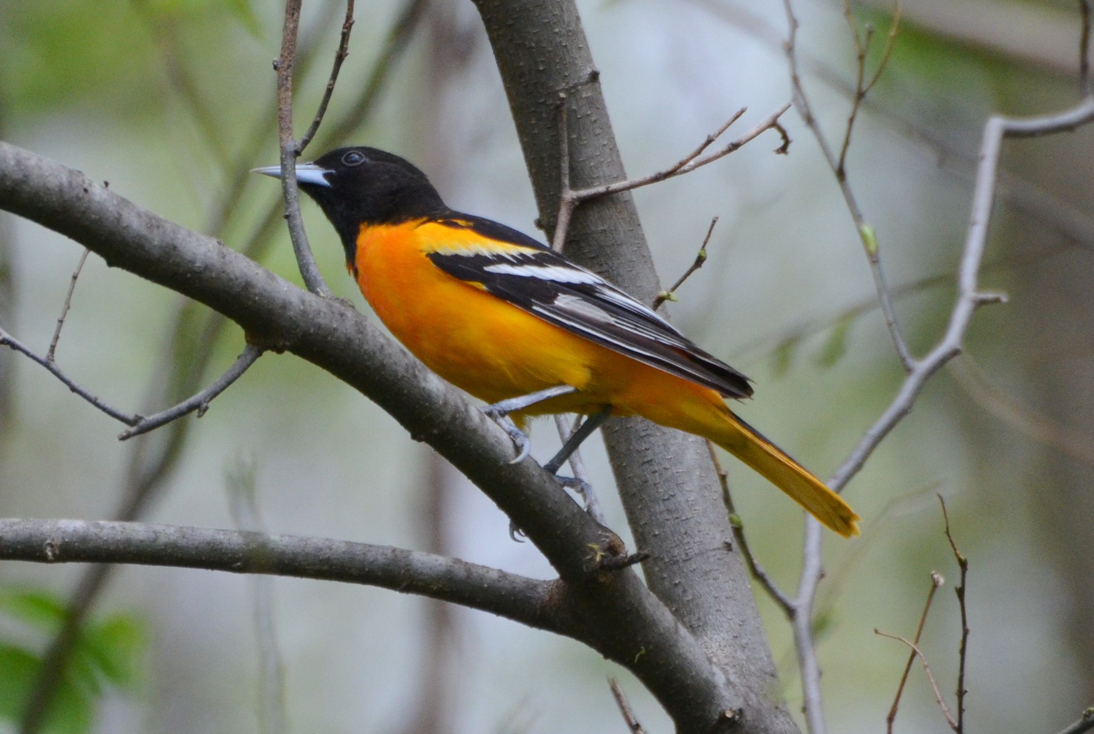 Emmenegger Nature Park 4/27/14